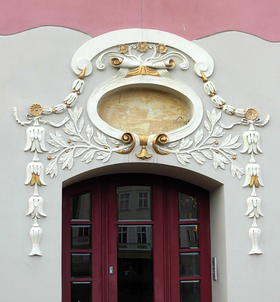 Kamienica Farna 2 Bydgoszcz